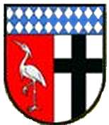 Wappen von Rayerschied